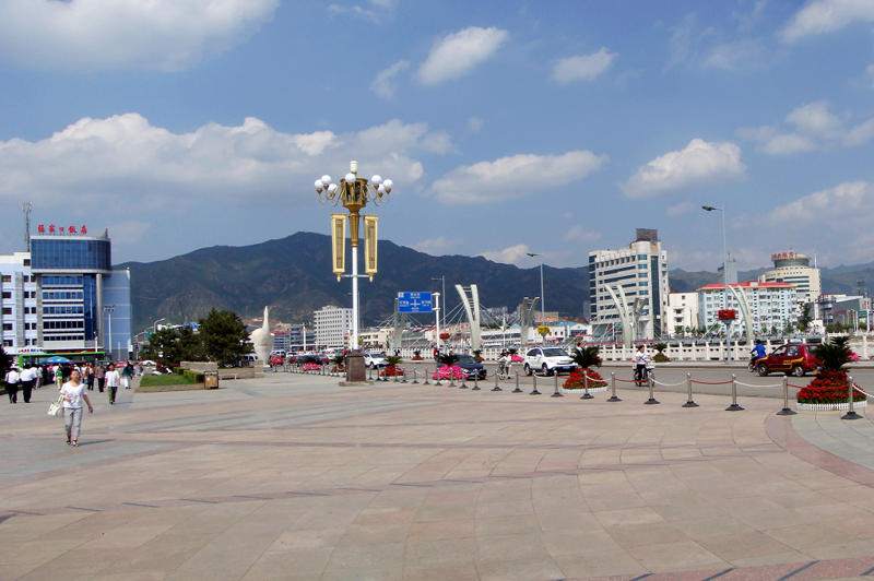 张家口市东太平山，拍摄于张家口市文化广场，2010年6月10日。